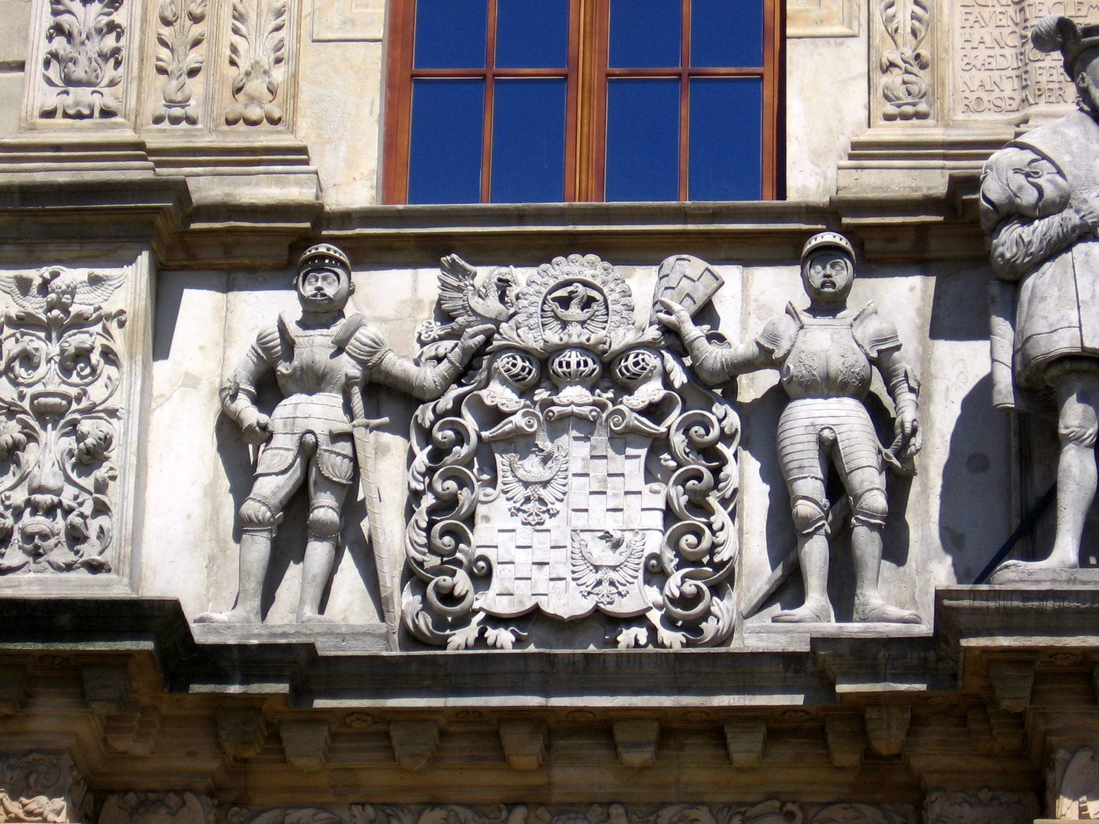 Brzeg - zamek